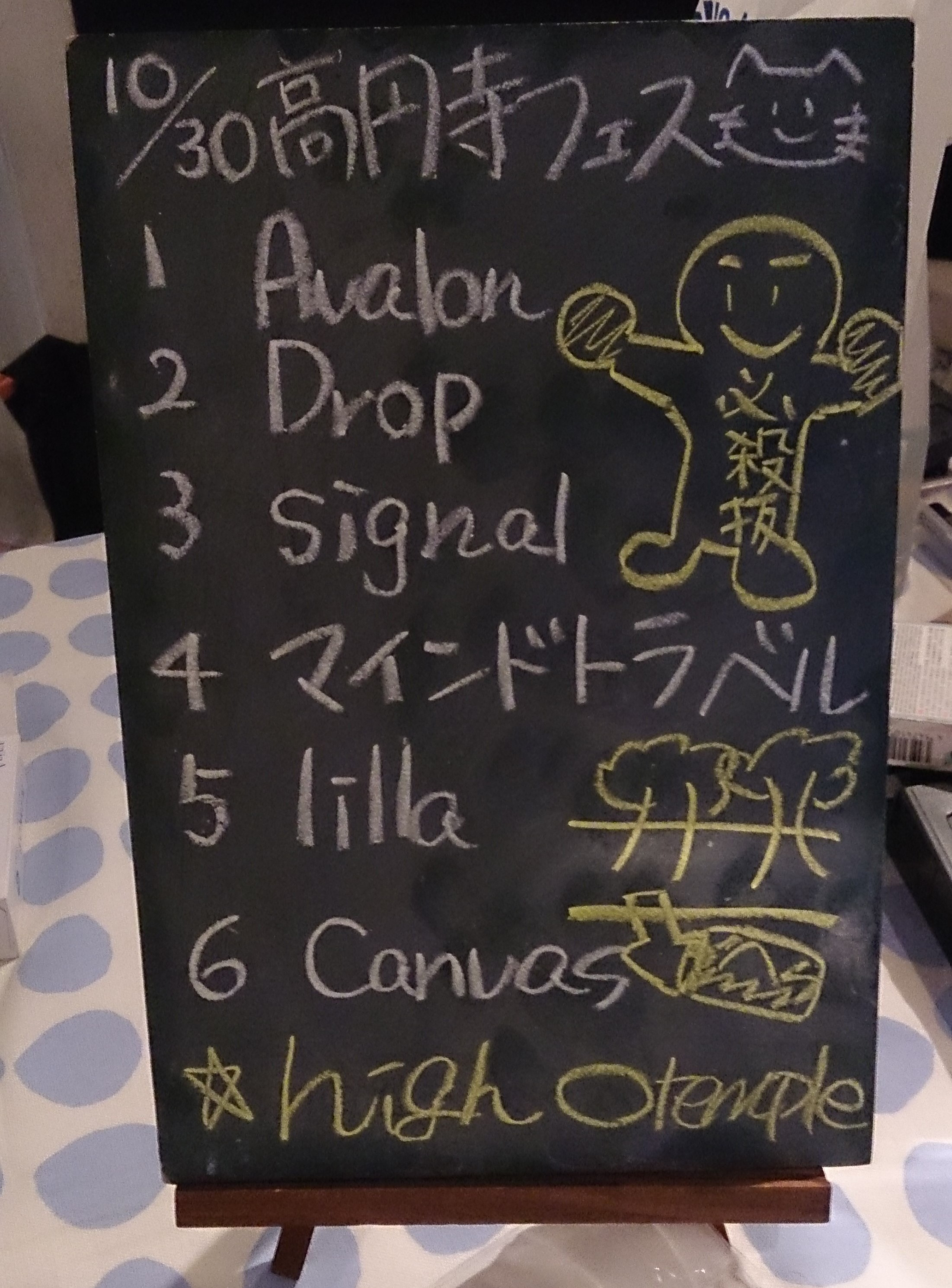 amiinAセトリボード(20161030(2))